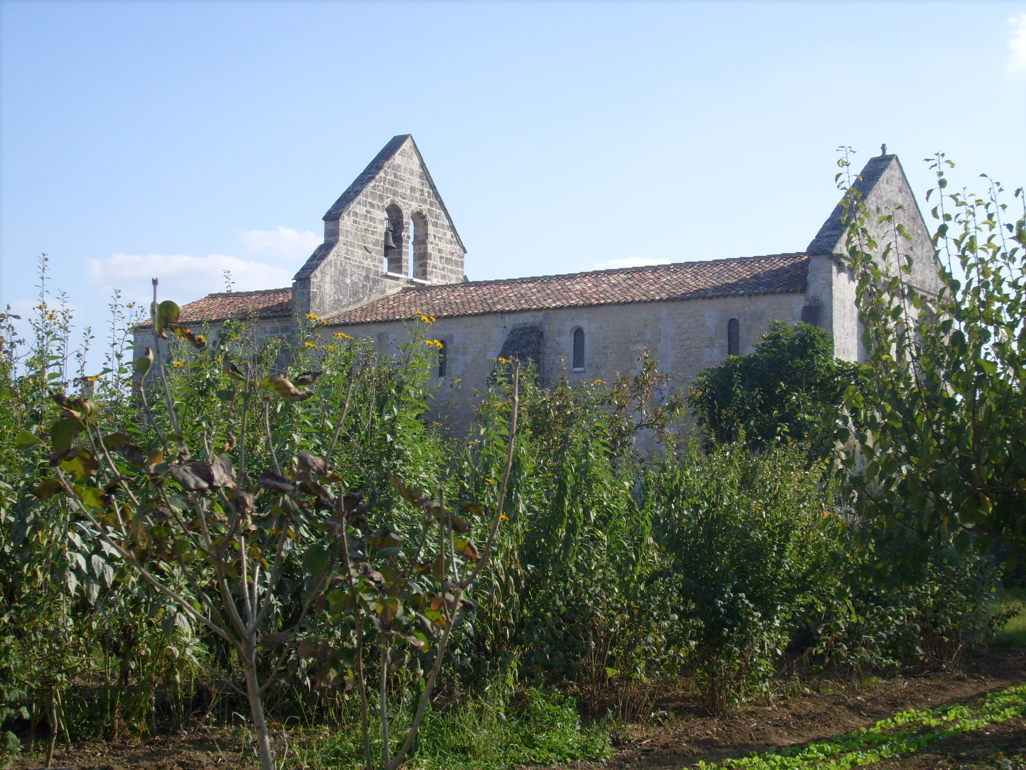 Eglise de Sainte-Radegonde